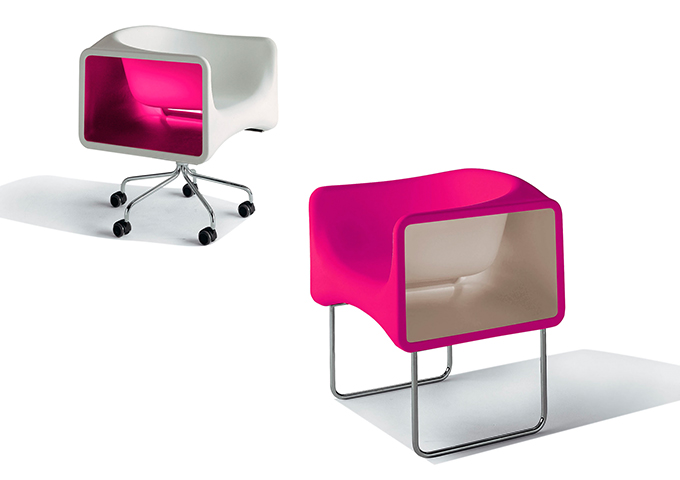 YU CHAIR